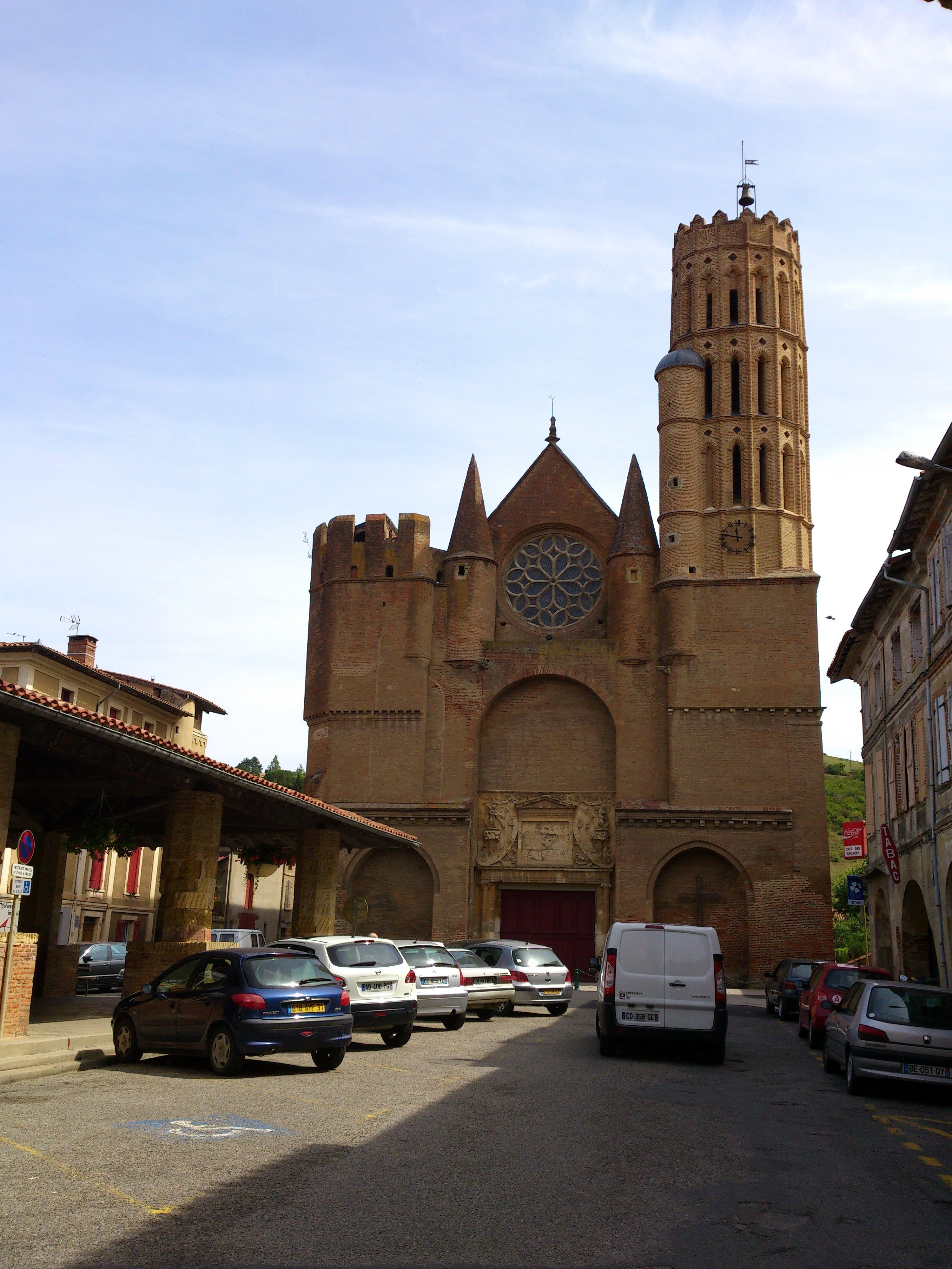 Eglise Saint-Victor (XIIIème siècle)